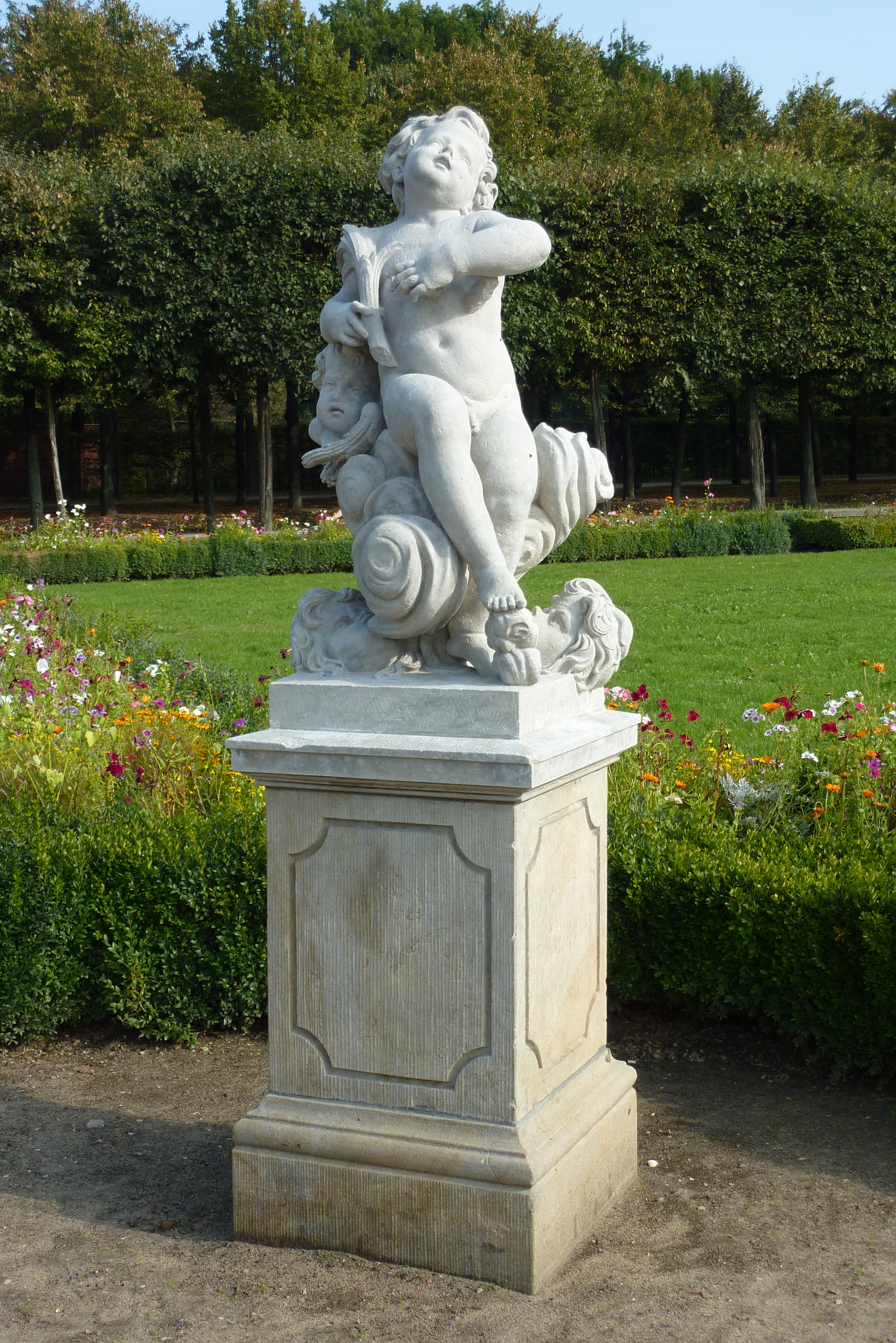 Skulptur „Sanguiniker“ der „Vier Temperamente“ nach Gottfried Knöffler, Südostposition im nördlichen Rondell des Schlossgartens im Tierpark Berlin (Friedrichsfelde). Kopie von Rolf Winkler und Heinz Worner aus dem Jahr 1960.